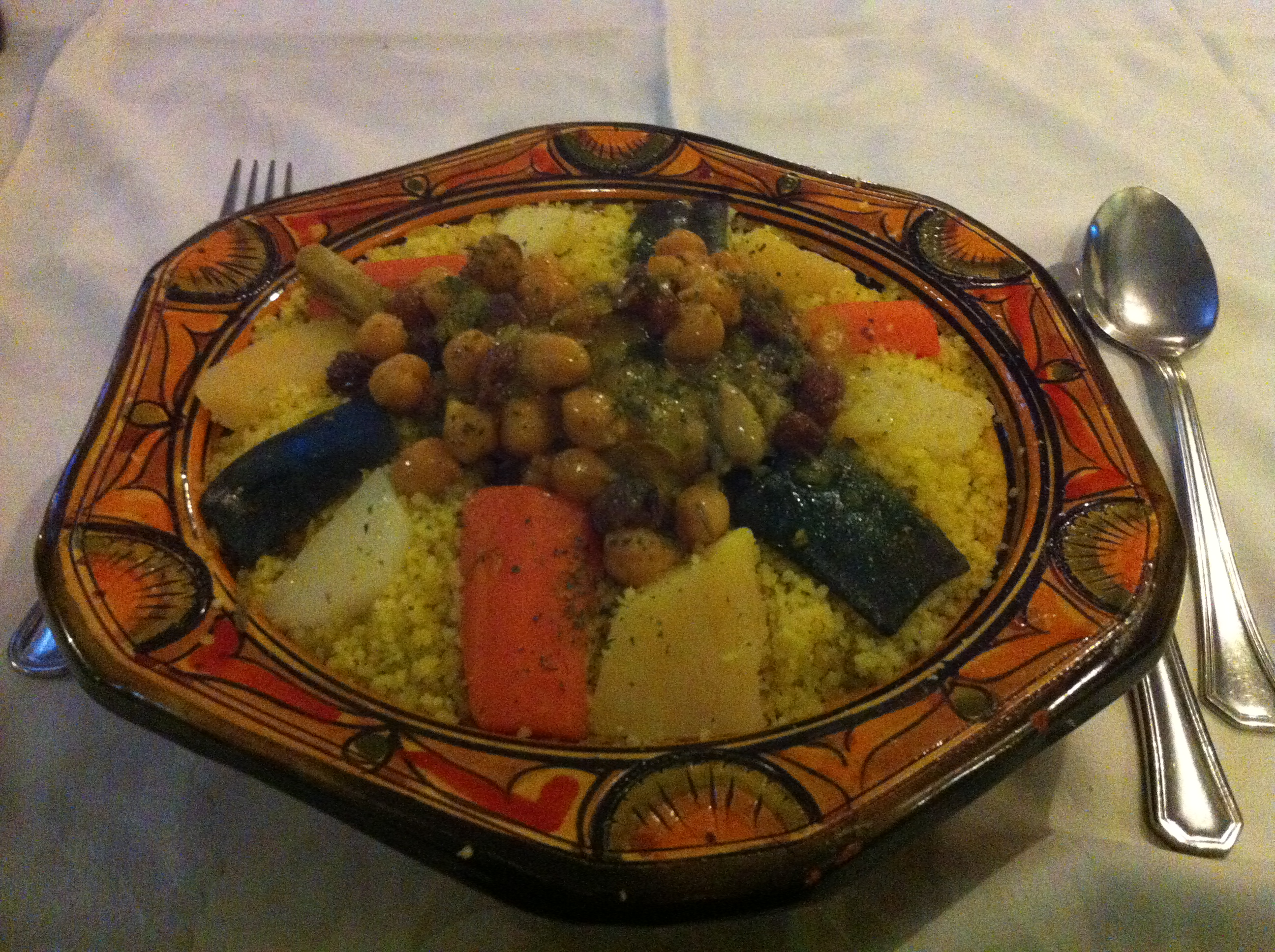 Cuscús de pollo.